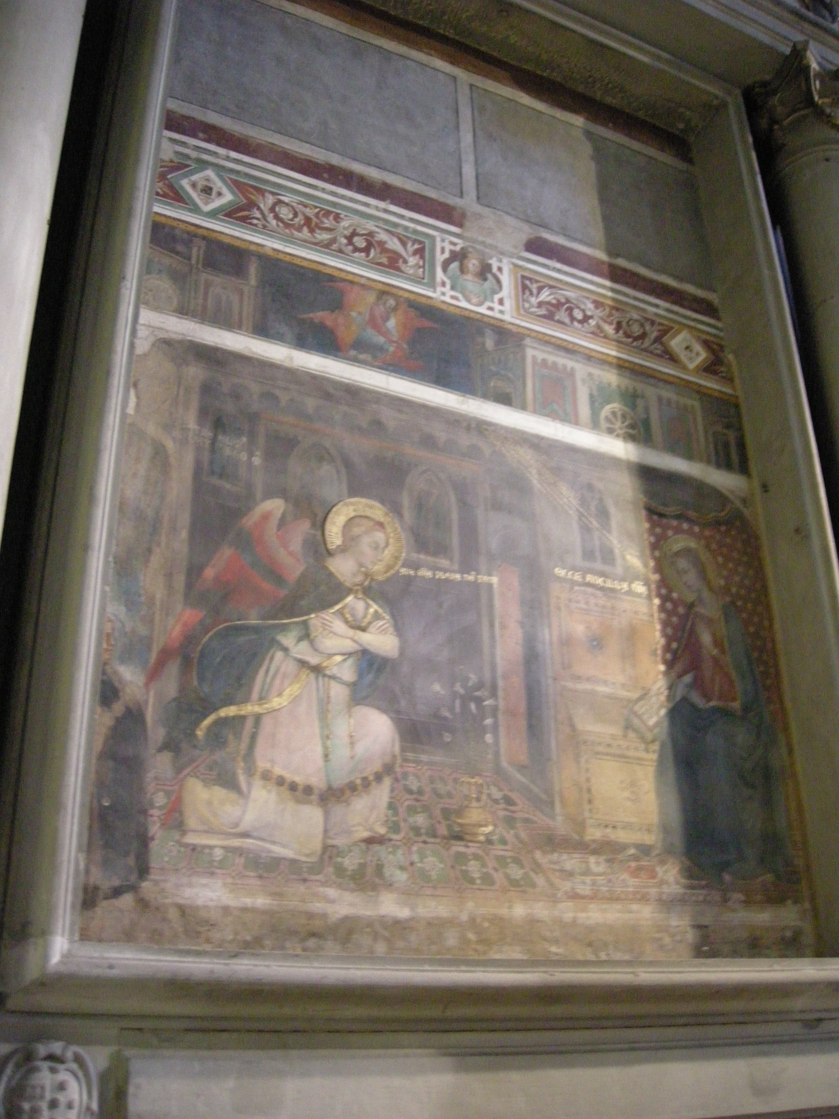 San marco, firenze, altare NETTOLI BECCHI, jacopo di cione, annunciazione, 1371 circa